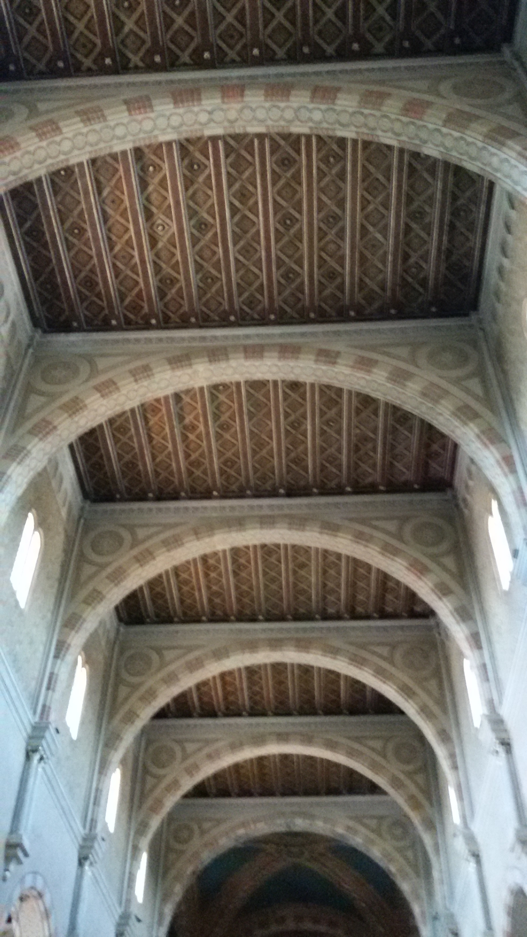 Chiesa di Santa Cristina Quinto di Treviso